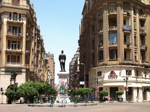 Plaza Talaat Harb.